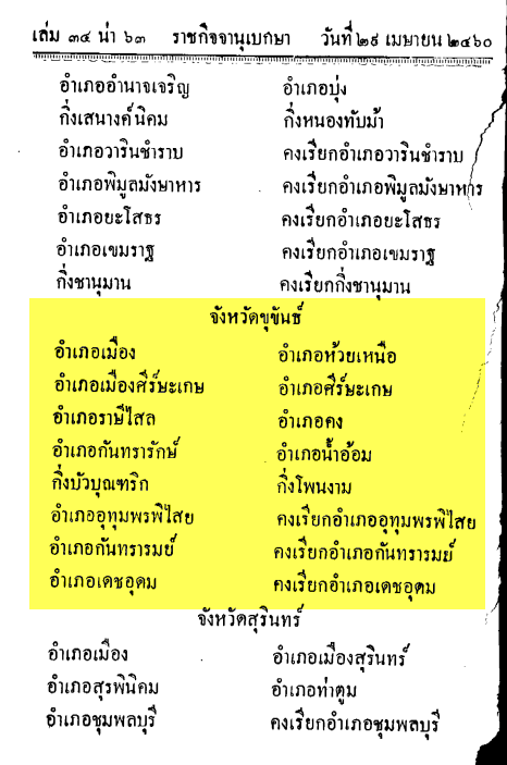 อาณาเขตของเมืองขุขันธ์ ในอดีต ครอบคลุมถึงเขตอำเภอเดชอุดม อำเภอบุณฑริก ซึ่งรวมพื้นที่ของอำเภอน้ำยืน อำเภอนาจะหลวย อำเภอทุ่งศรีนคร และกิ่งอำเภอน้ำขุ่น จังหวัดอุบลราชธานีในปัจจุบันนี้ด้วย ดังประกาศในราชกิจจานุเบกษา ประกาศเรื่องเปลี่ยนชื่ออำเภอ เล่ม ๓๔ หน้า ๔๐ และหน้า ๖๓ วันที่ ๒๙ เมษายน ๒๔๖๐ ซึ่งลงนามโดยมหาเสวกเอก เจ้าพระยาสุรสีห์ วิสิษฐศักดิ์ เสนาบดีกระทรวงมหาดไทย ประกาศมา ณ วันที่ ๒๔ เมษายน พ.ศ. ๒๔๖๐ ด้วยเหตุผลว่าเพื่อให้เป็นที่สะดวกในทางราชการและเป็นที่เข้าใจแจ่มแจ้งแห่งประชุมชนทั่วไปว่าอำเภอใดคงเรียกตามชื่อเดิม อำเภอใดเปลี่ยนชื่อเรียกตามนามตำบล จึงทรงพระกรุณาโปรดเกล้าฯให้ประกาศชื่ออำเภอ ทั้งที่คงชื่อเดิมและเปลี่ยนชื่อใหม่ ดังบัญชีท้ายประกาศนี้ใช้เป็นระเบียบในราชการสืบไป อำเภอเมือง เป็น อำเภอห้วยเหนือ อำเภอเมืองศีร์ษะเกษ เป็น อำเภอศีร์ษะเกษ อำเภอราษีไสล เป็น อำเภอคง อำเภอกันทรารักษ์ เป็น อำเภอน้ำอ้อม กิ่งบัวบุณฑริก เป็น กิ่งโพนงาม อำเภออุทุมพรพิสัย คงเรียก อำเภออุทุมพรพิสัย อำเภอกันทรารมย์ คงเรียก อำเภอกันทรารมย์ อำเภอเดชอุดม คงเรียก อำเภอเดชอุดม